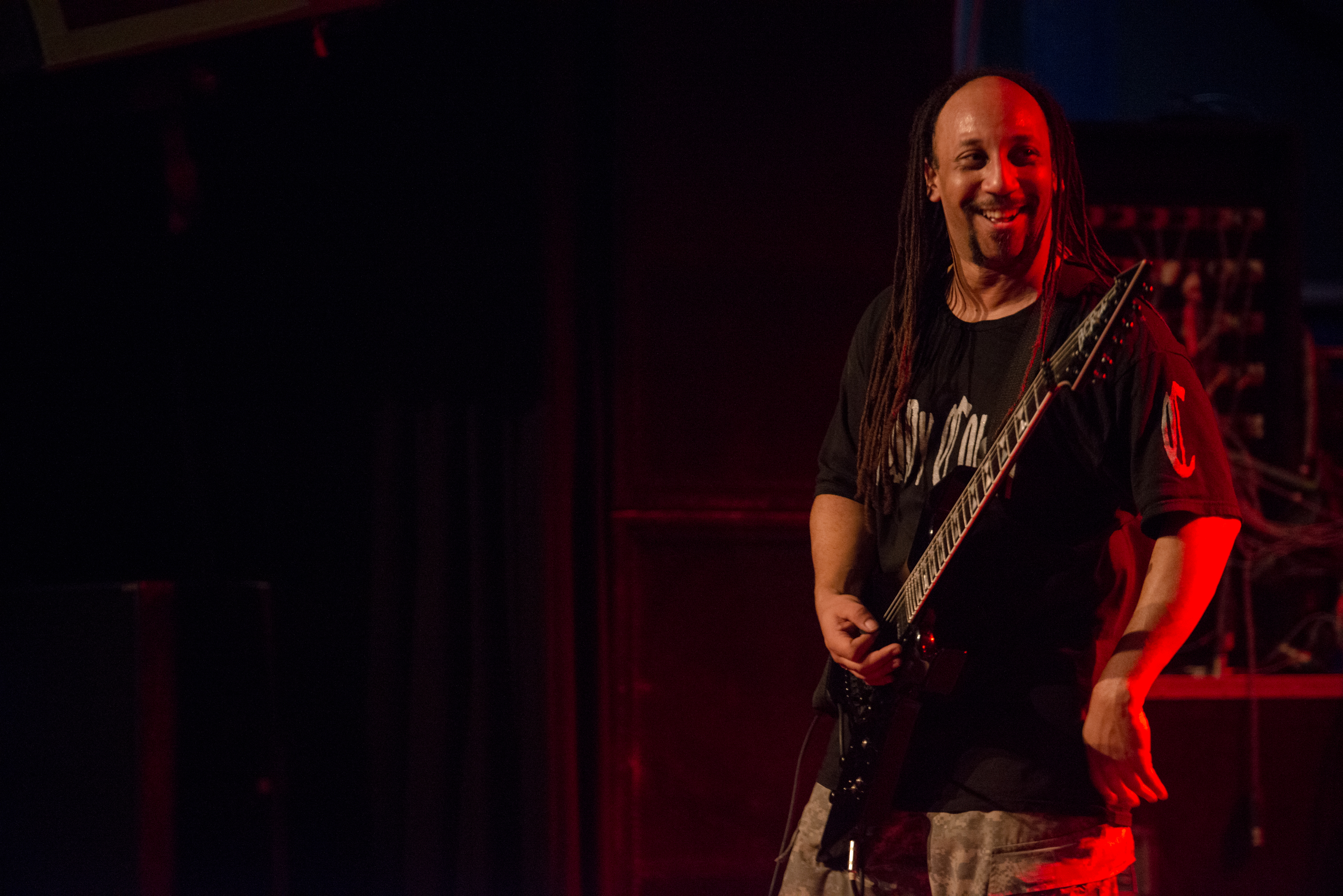 de